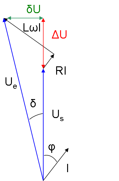 Illustration de la chute de tension dans une ligne électrique modélisée par une inductance et une résistance